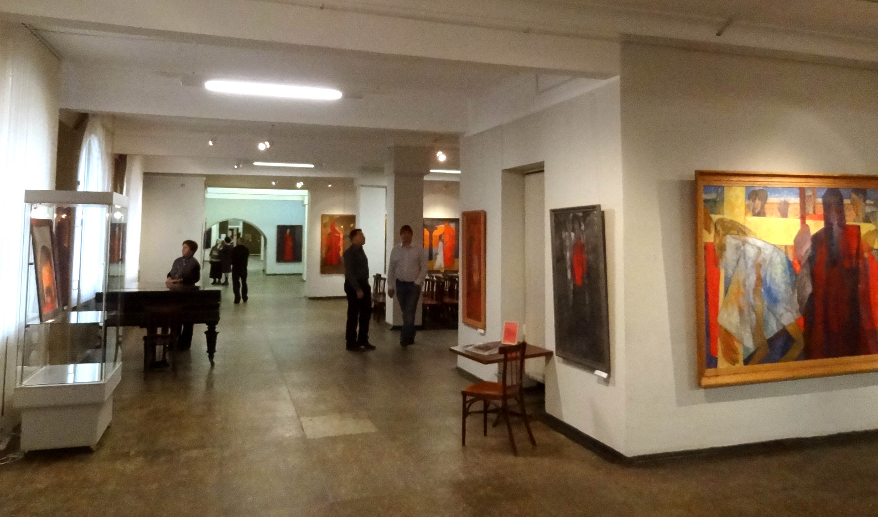 Персональная выставка Александра Мочалова "Ассоциации" (живопись).